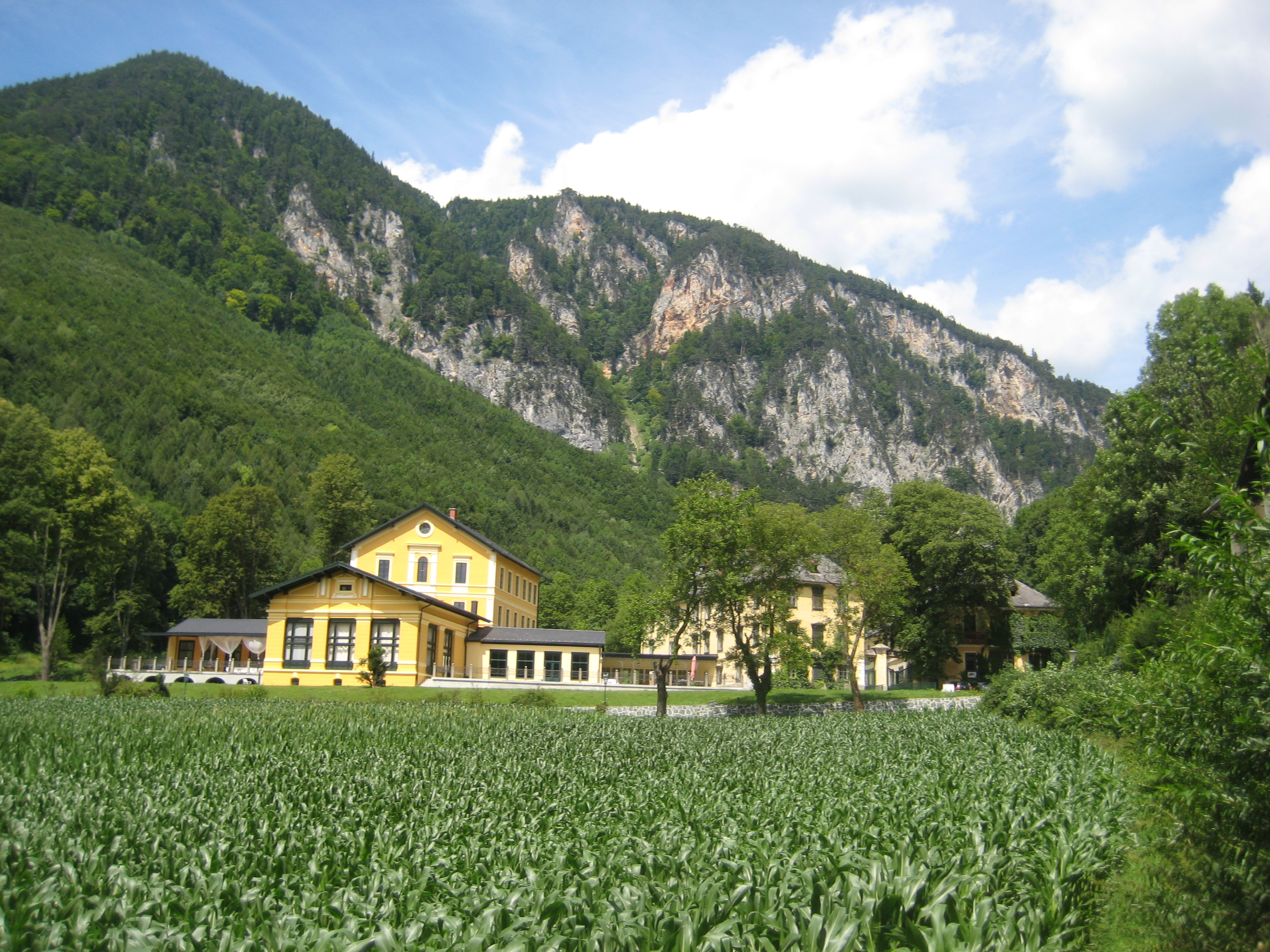 Kurhaus Thalhof in Reichenau an der Rax (Niederösterreich)